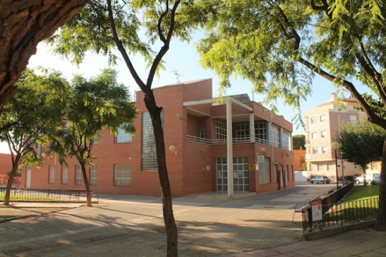 Edificio que alberga las oficinas municipales de la pedanía de Guadalupe